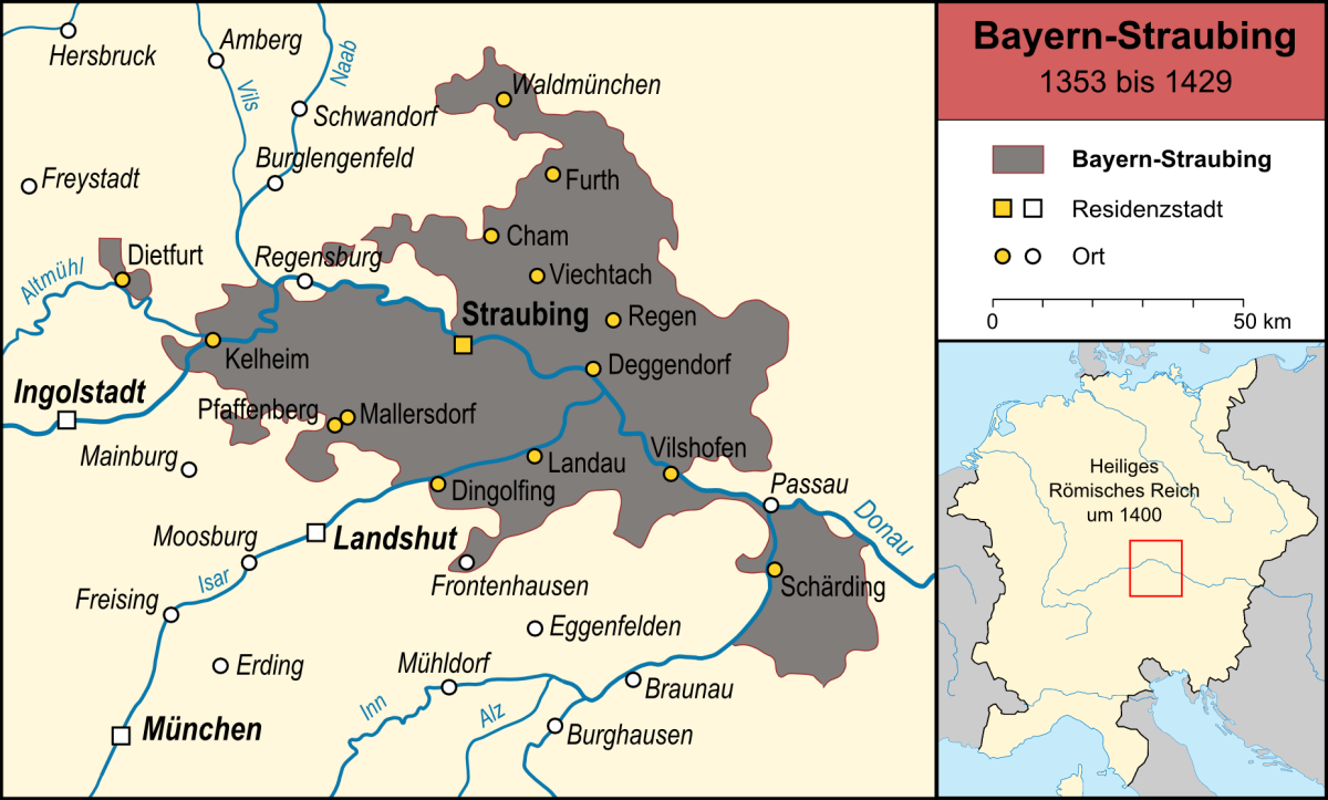 Bayern-Straubing nach der Teilung Bayerns 1392, Gebietsstand bis 1429